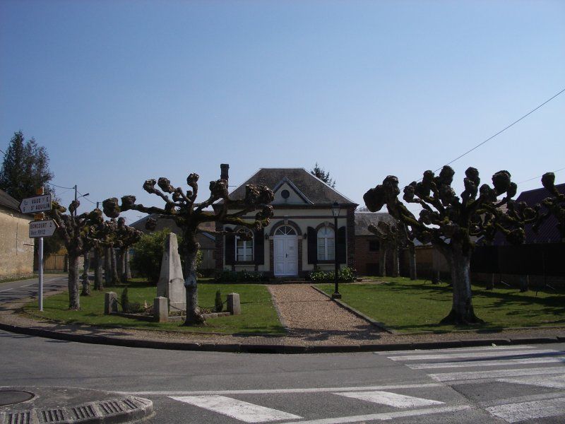 La mairie d'Hardencourt-Cocherel